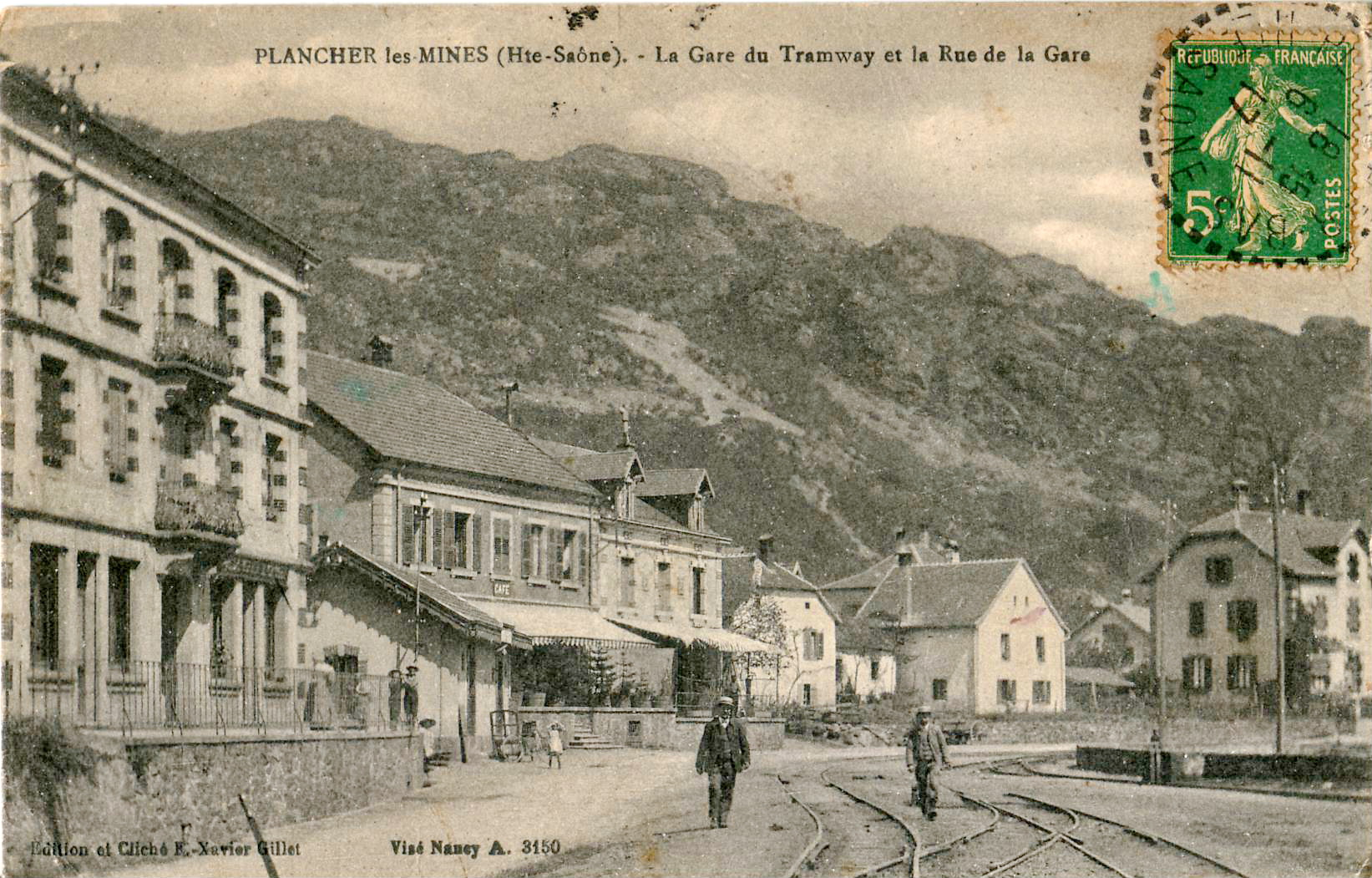 Carte postale ancienne éditée par François-Xavier Gillet, avec visa de censure à Nancy :PLANCHER-LES-MINES - La Gare du Tramway et la Rue de la Gare